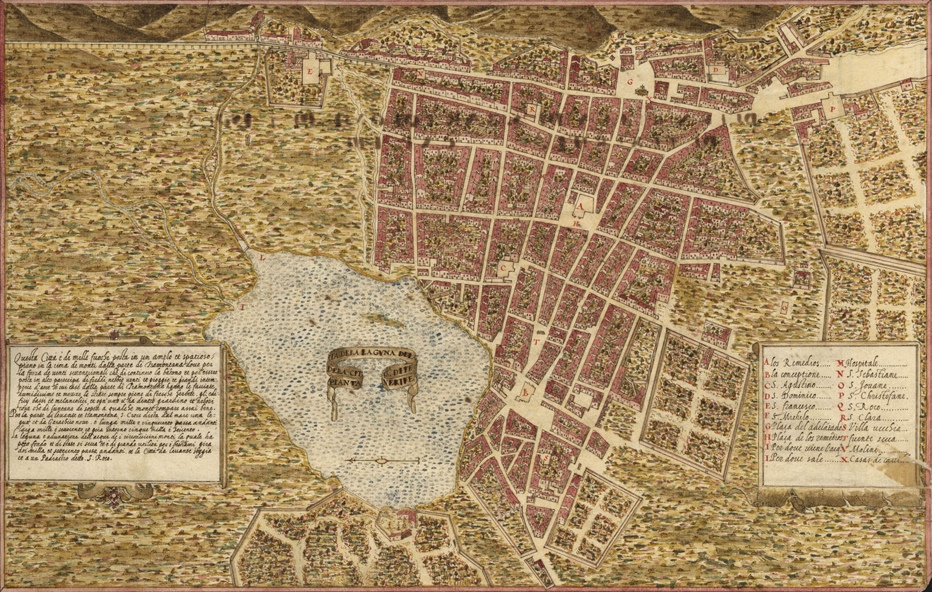 Ansicht der Stadt La Laguna auf Teneriffa, dargestellt Ende des 16. Jahrhunderts durch Leonardo Torriani